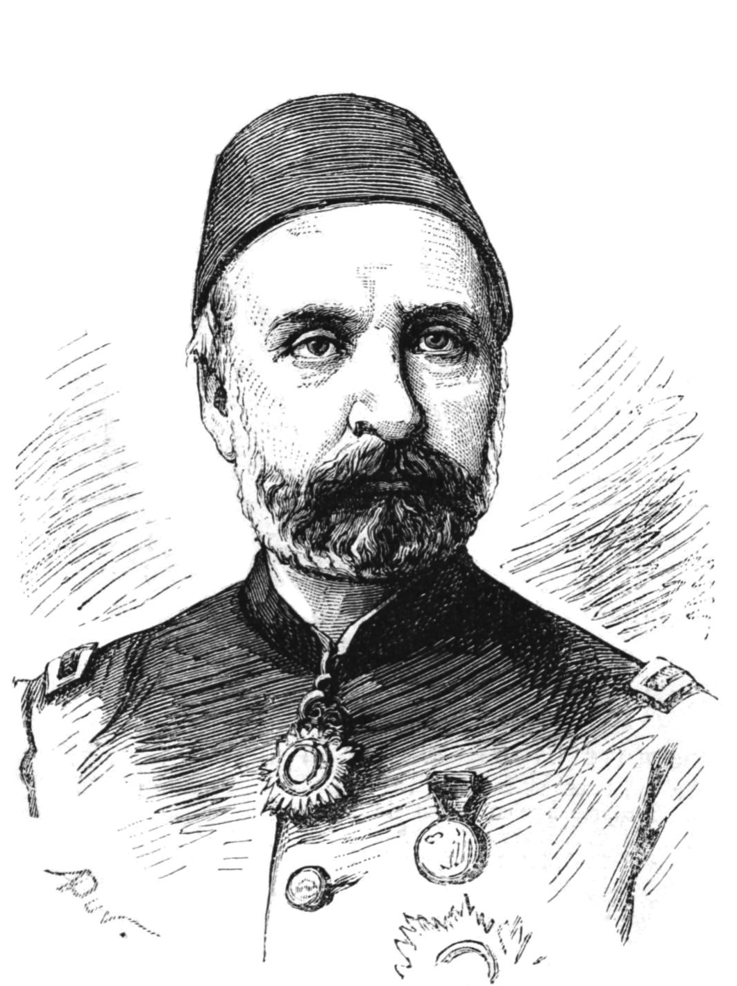 "Mehmet-Rifat-Pacha, ex-gouverneur général de Salonique".